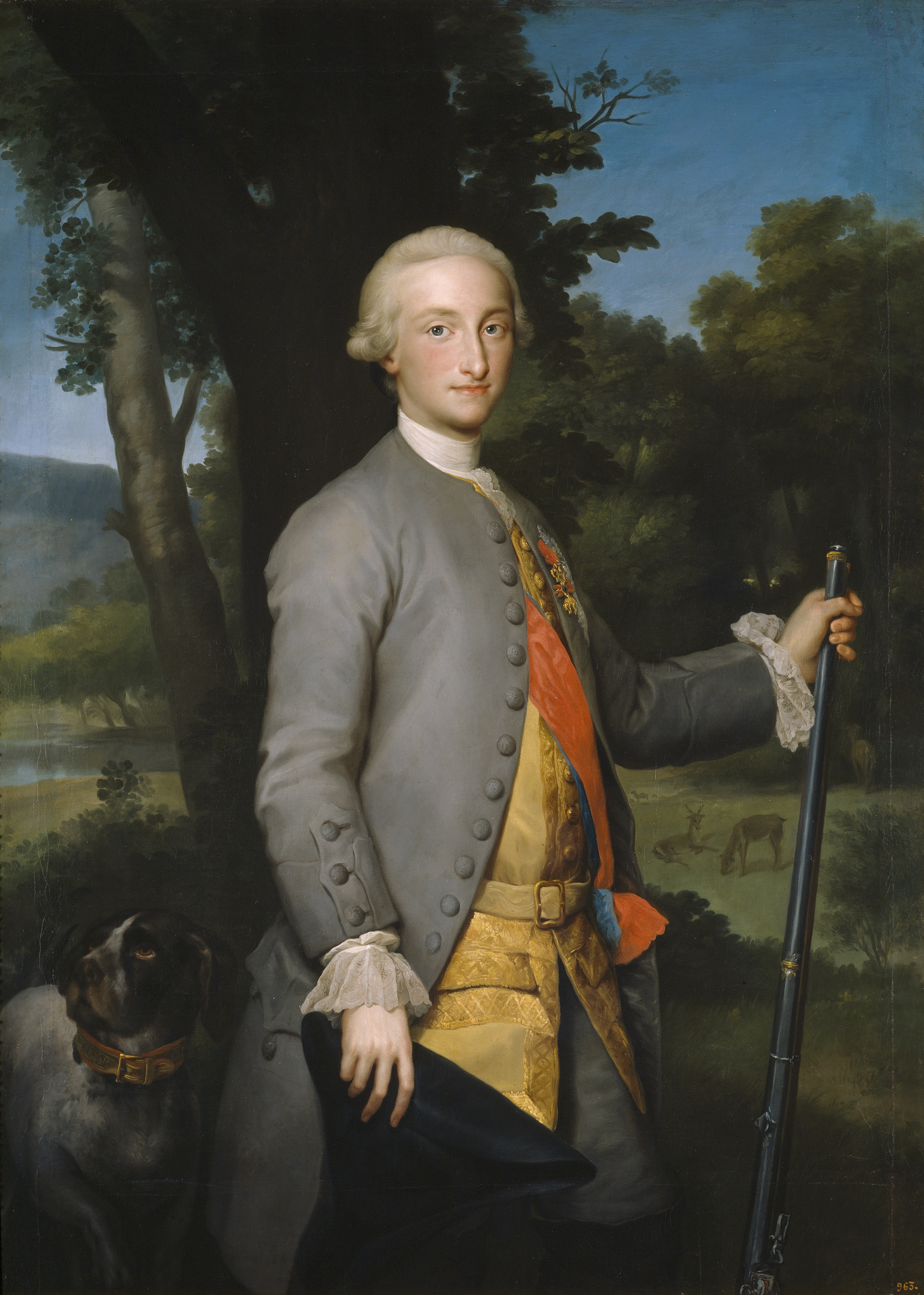 Retrato del príncipe de Asturias Carlos de Borbón (1748-1819), que fue hijo del rey Carlos III de España y llegaría a reinar en España como Carlos IV.